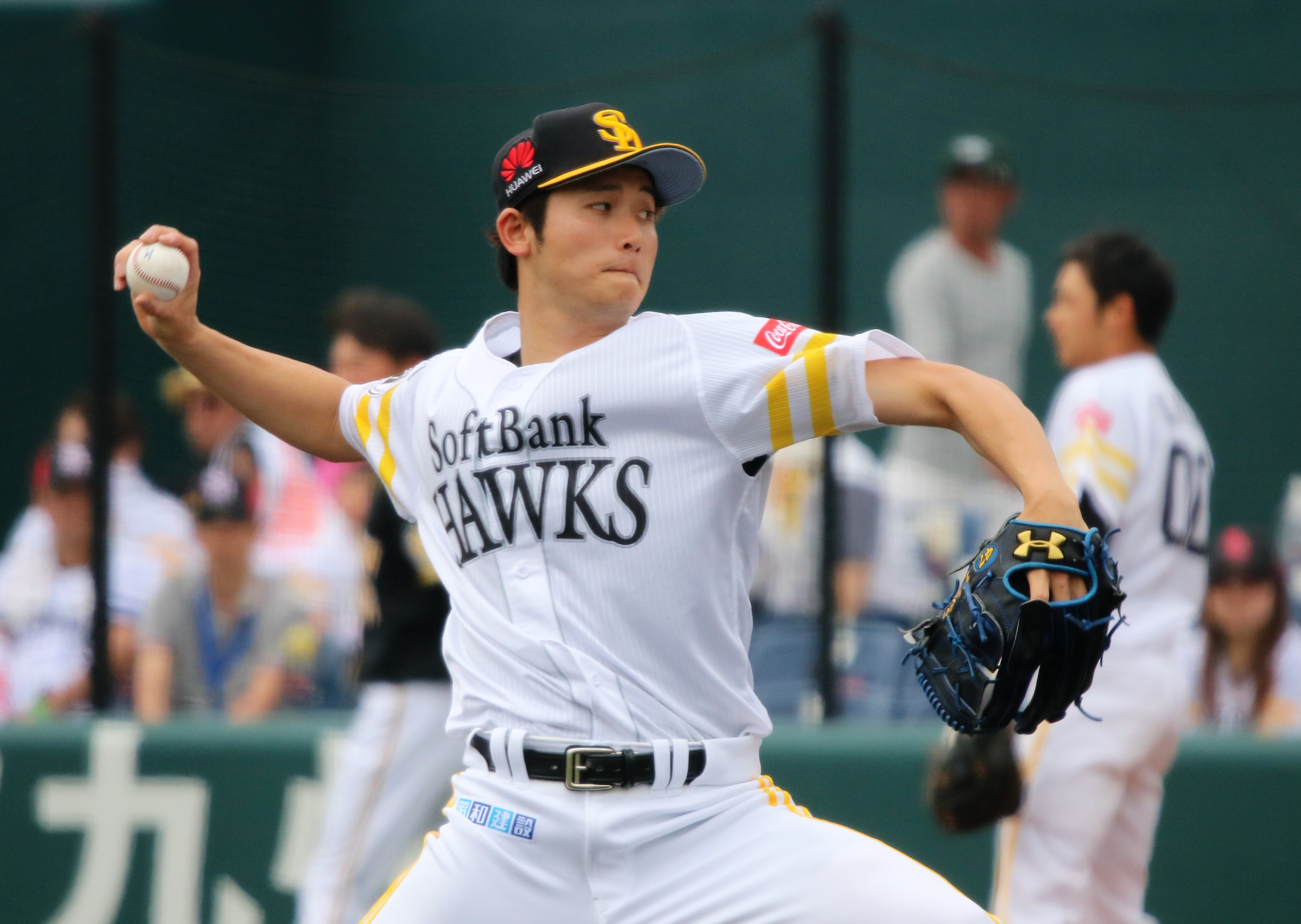 2018/5/1 ウエスタンリーグ